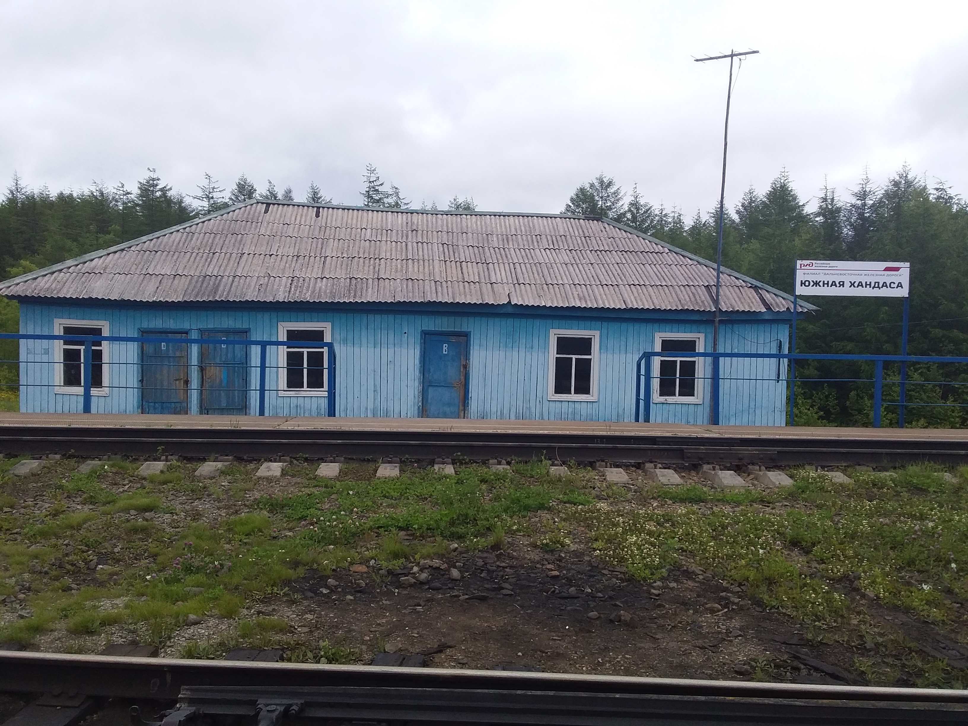 Сахалинский регион ДВЖД, Станция Южная Хандаса